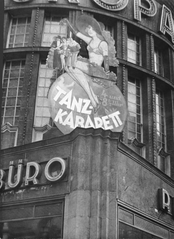 Berlin; Tanzkabarett im Europahaus, Stresemannstraße. 1931